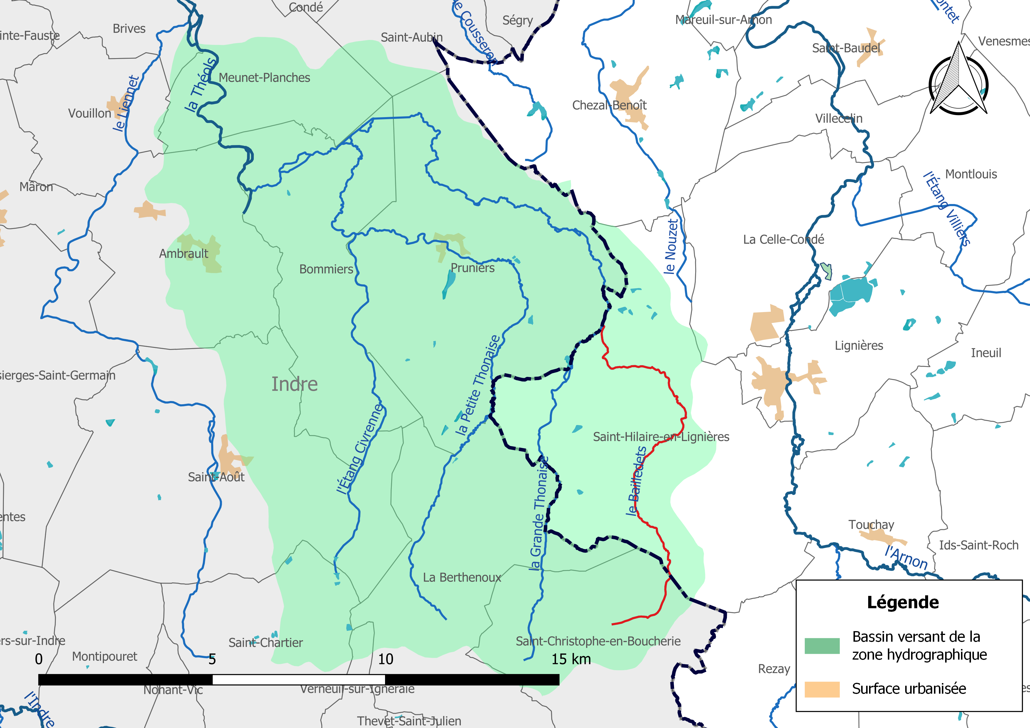 Carte du cours d'eau « les Bailledets » (France) et de la zone hydrographique dans laquelle il s'insère.